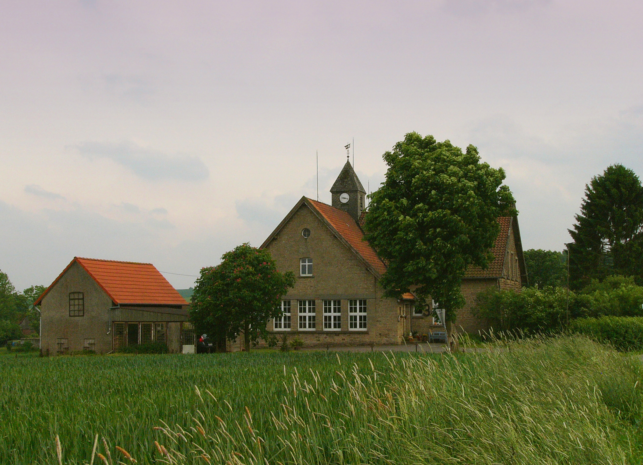 Alte Schule in Kleinenmarpe, Ortsteil von Blomberg, Germany